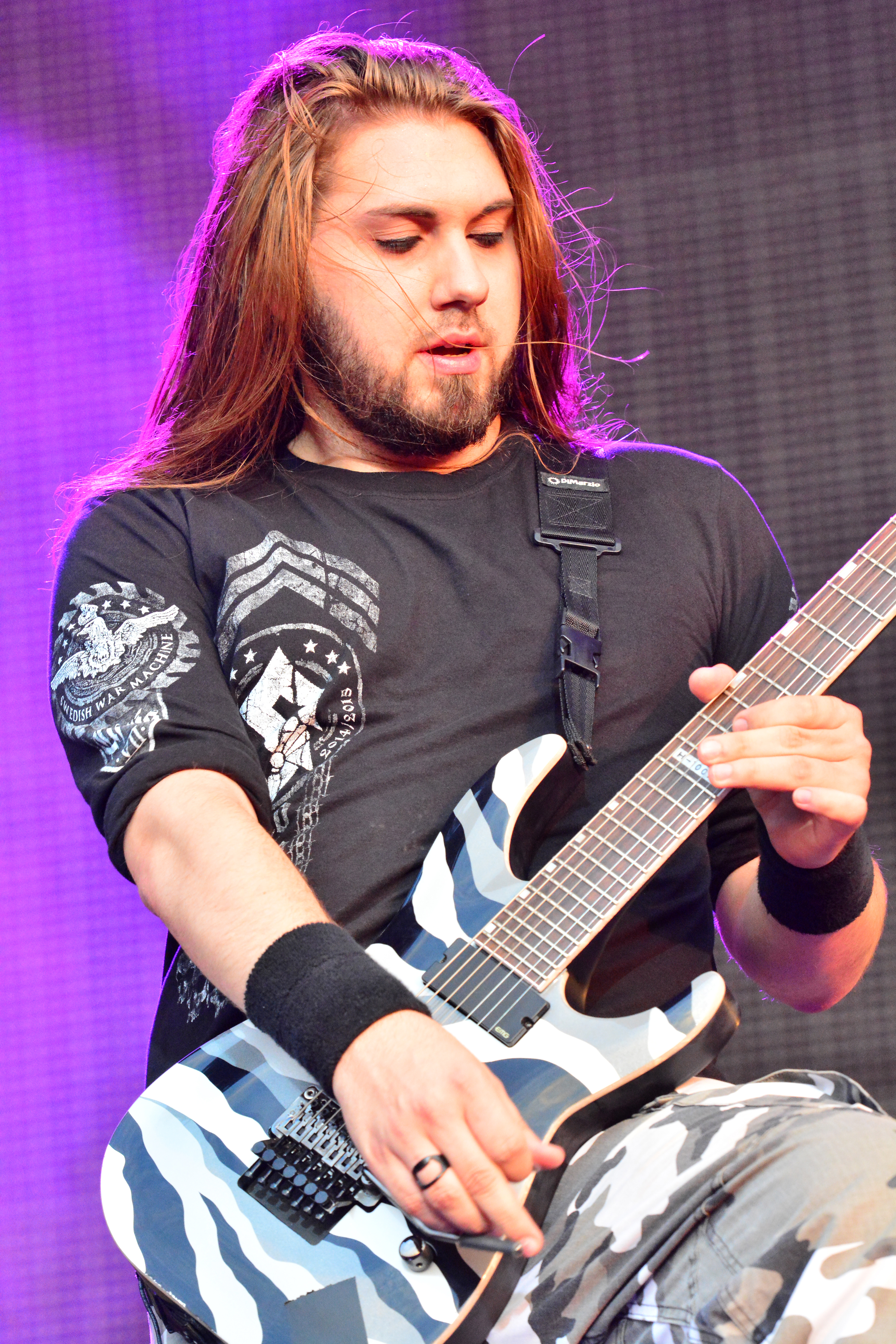 Sabaton beim Wacken Open Air 2015